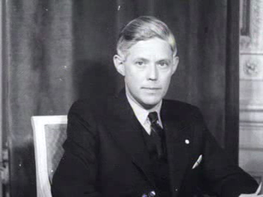 Frits Thors, Nederlands nieuwslezer.